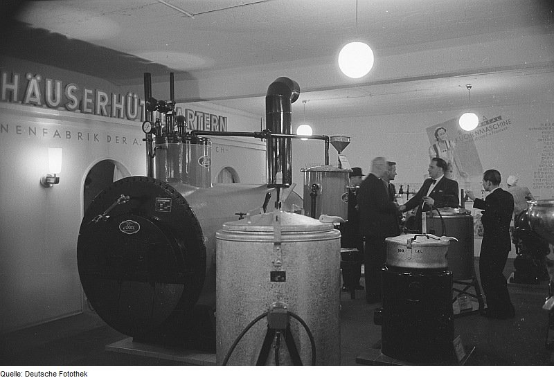 Original image description from the Deutsche Fotothek Fachbesucher am Messestand des VEB Kyffhäuserhütte Artern